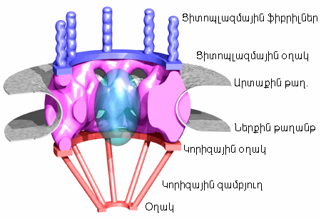 Կորիզաթաղանթի կառուցվածքը